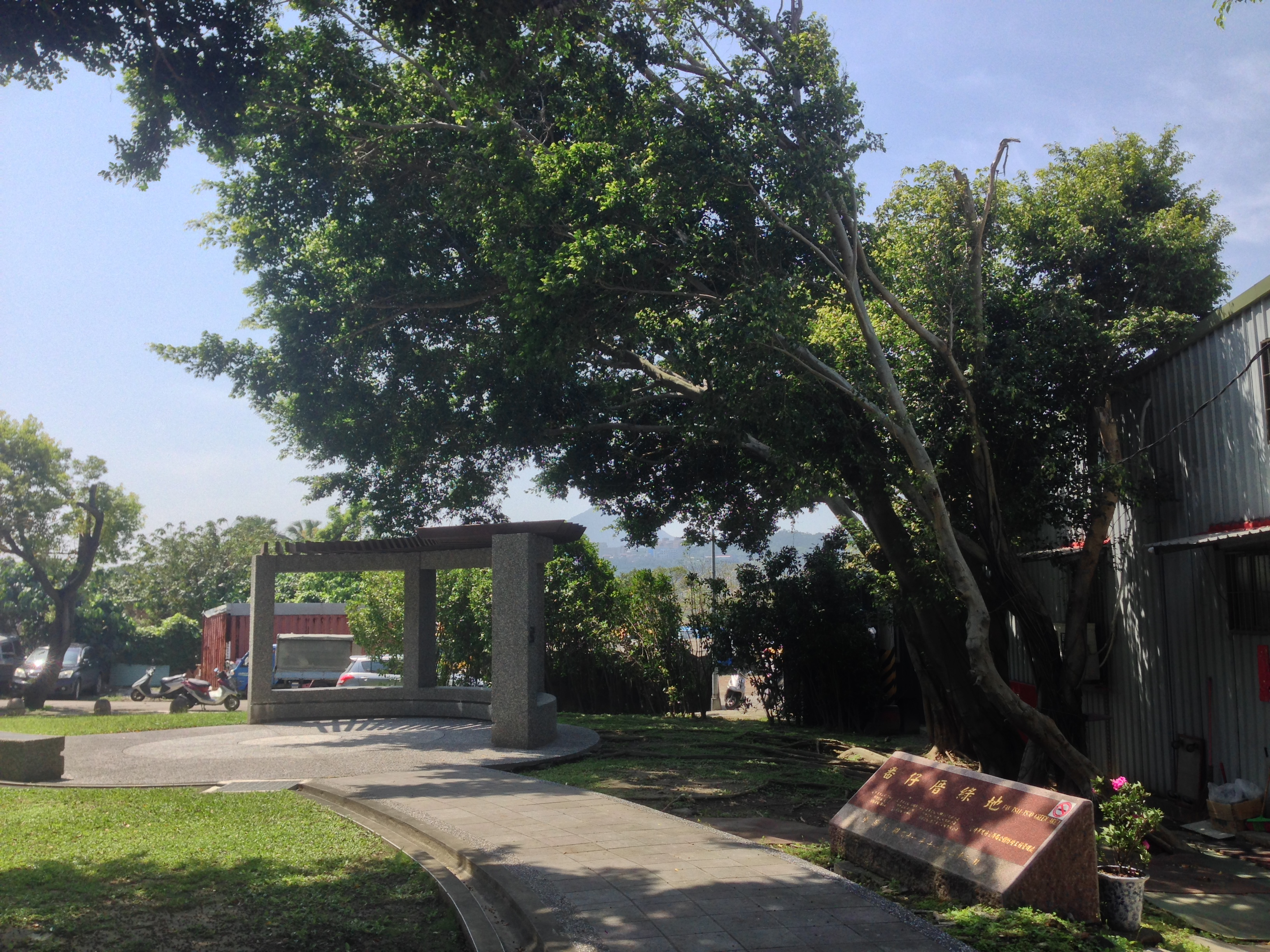 中文（台灣）: 番仔厝公園